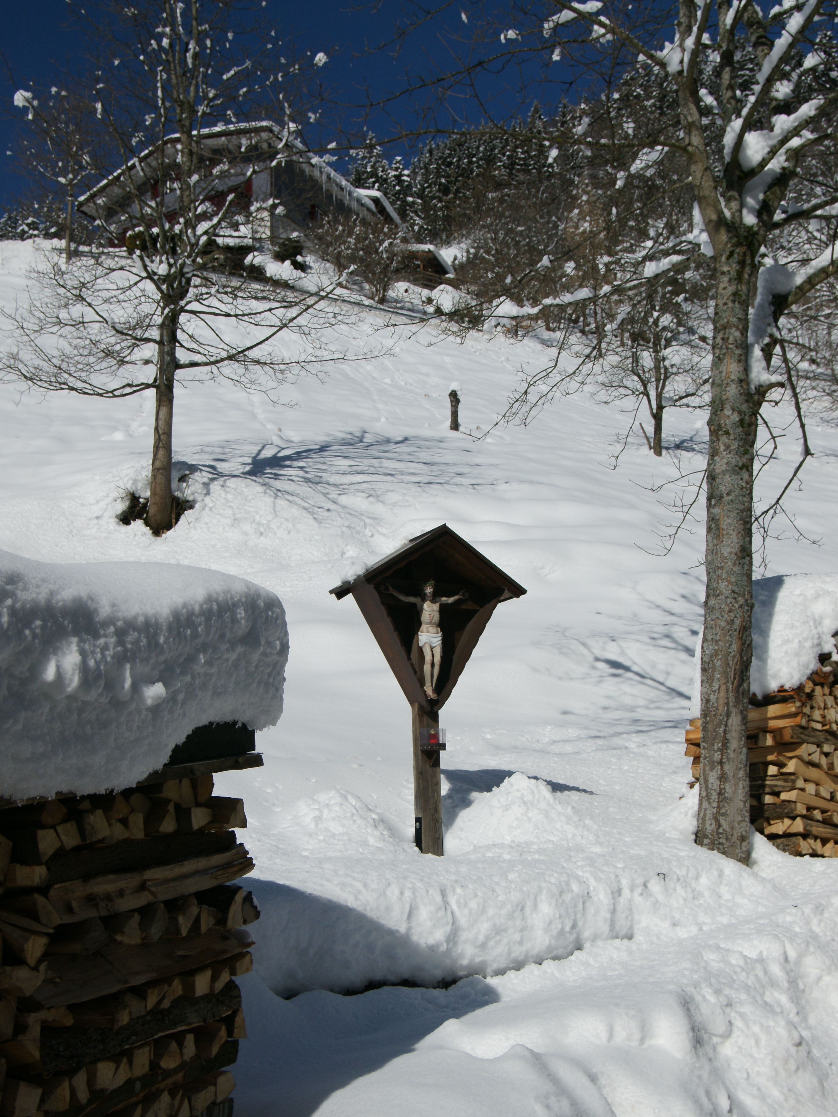 Ein Flurkreuz am Spaltenweg in Meschach bei Götzis.